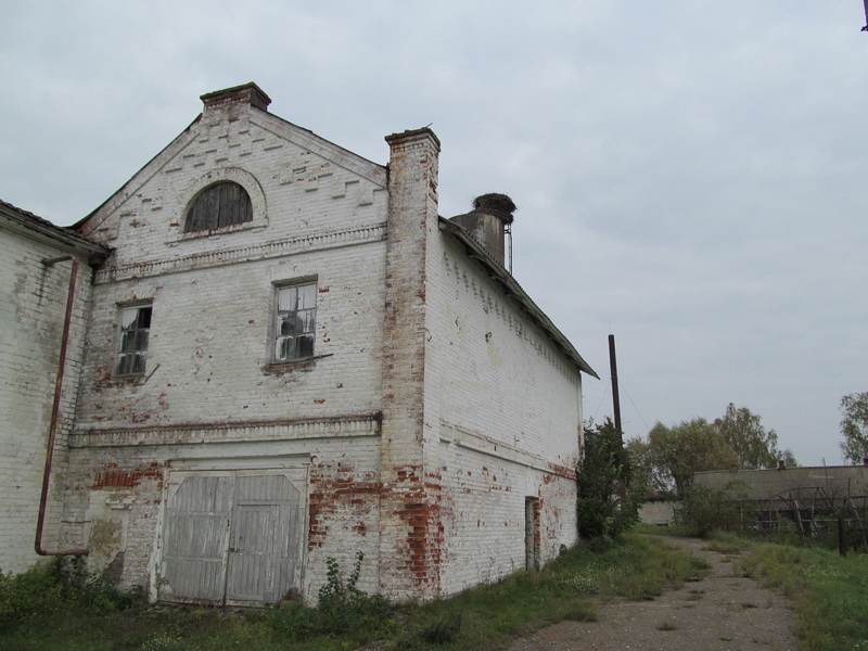 Палажэвічы. Бровар